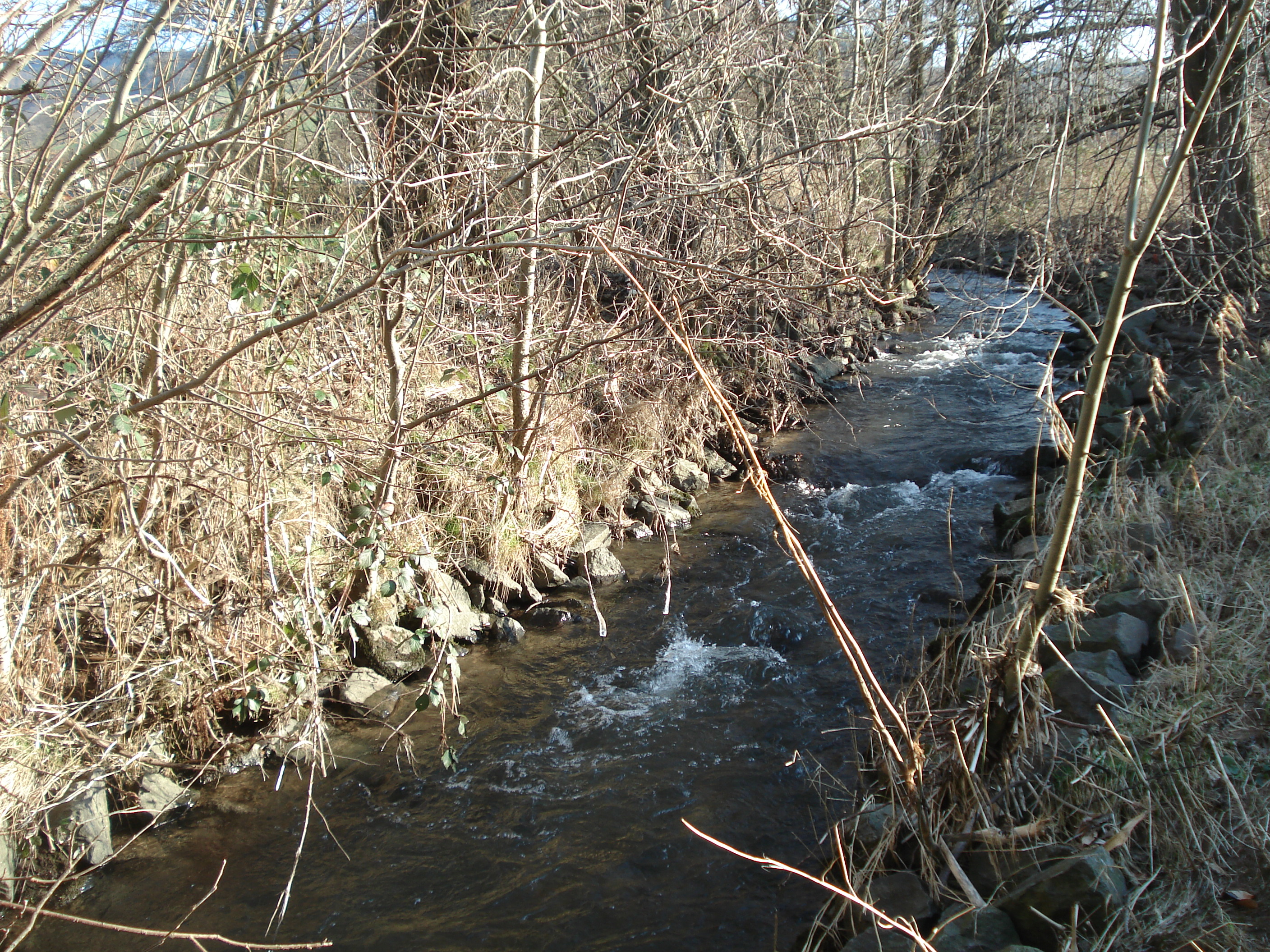 Der Osterbach kurz vor dem Zusammenfluss mit dem Mergbach zur Gesprenz